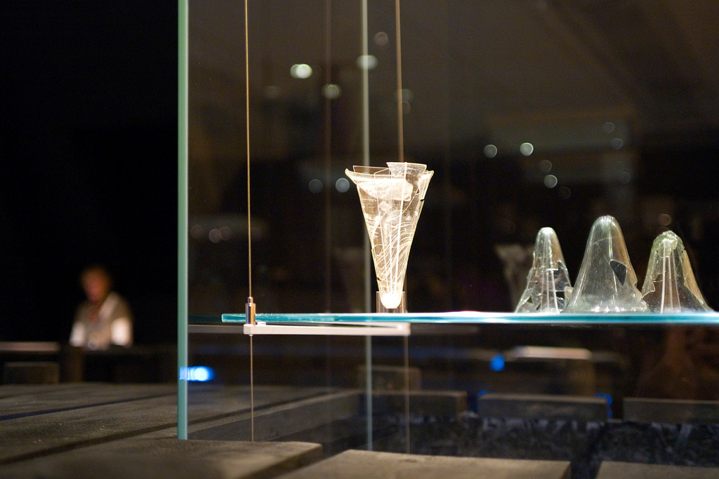 Bekers van Dorestad